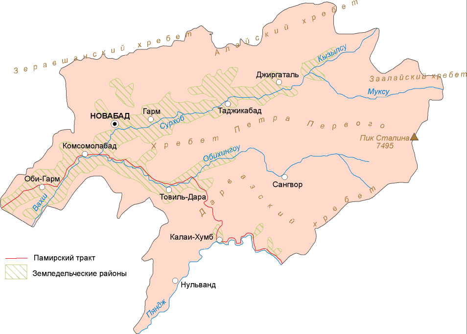 Карта Гармской области (начало 1950-х)